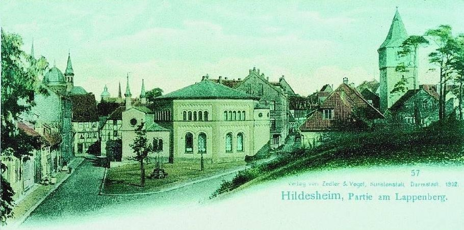 Synagoge in Hildesheim um 1902, kolorierte Postkarte des Verlages Zedler & Vogel, Darmstadt.